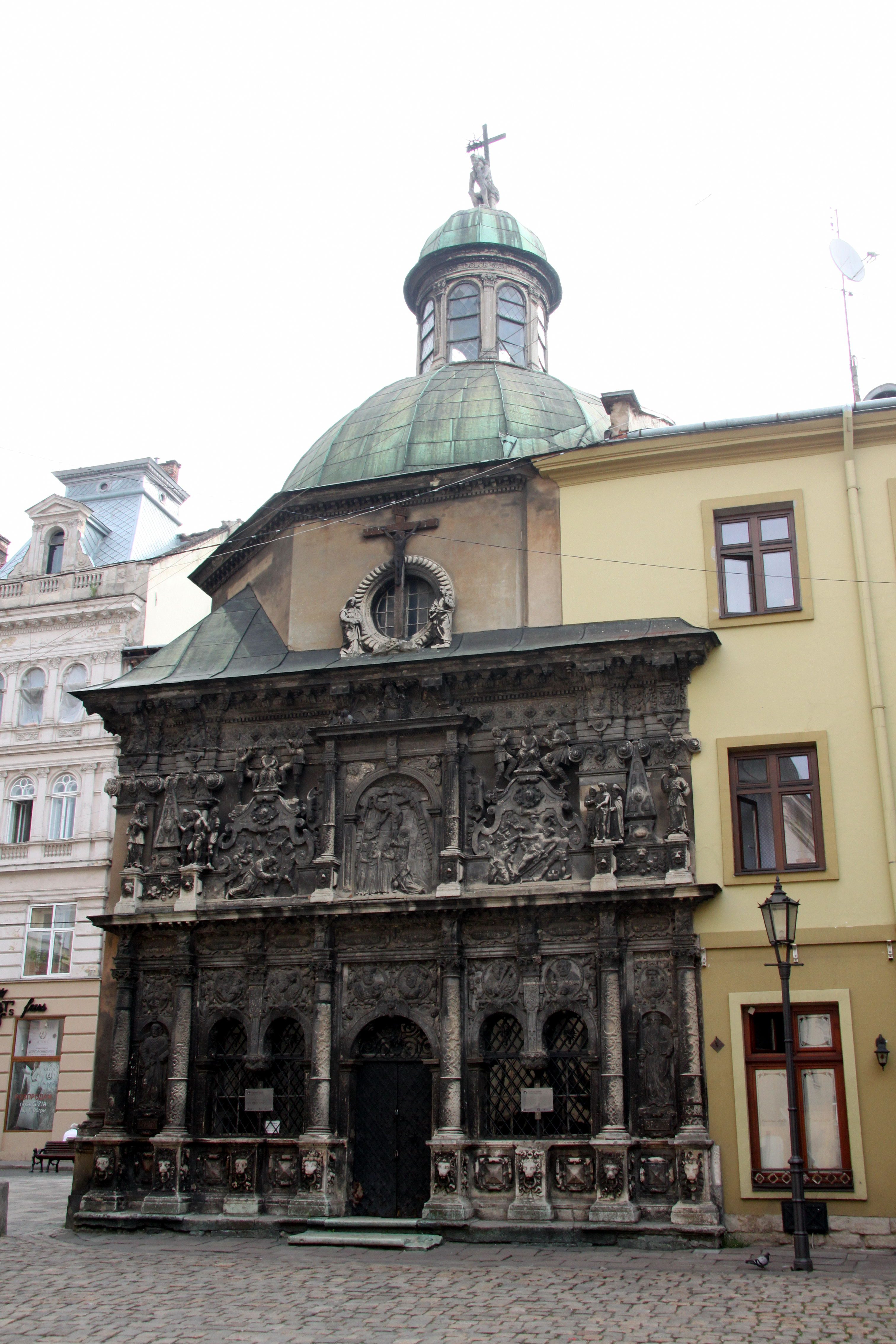 каплиця Боїмів, Катедральна пл., 1, Львів